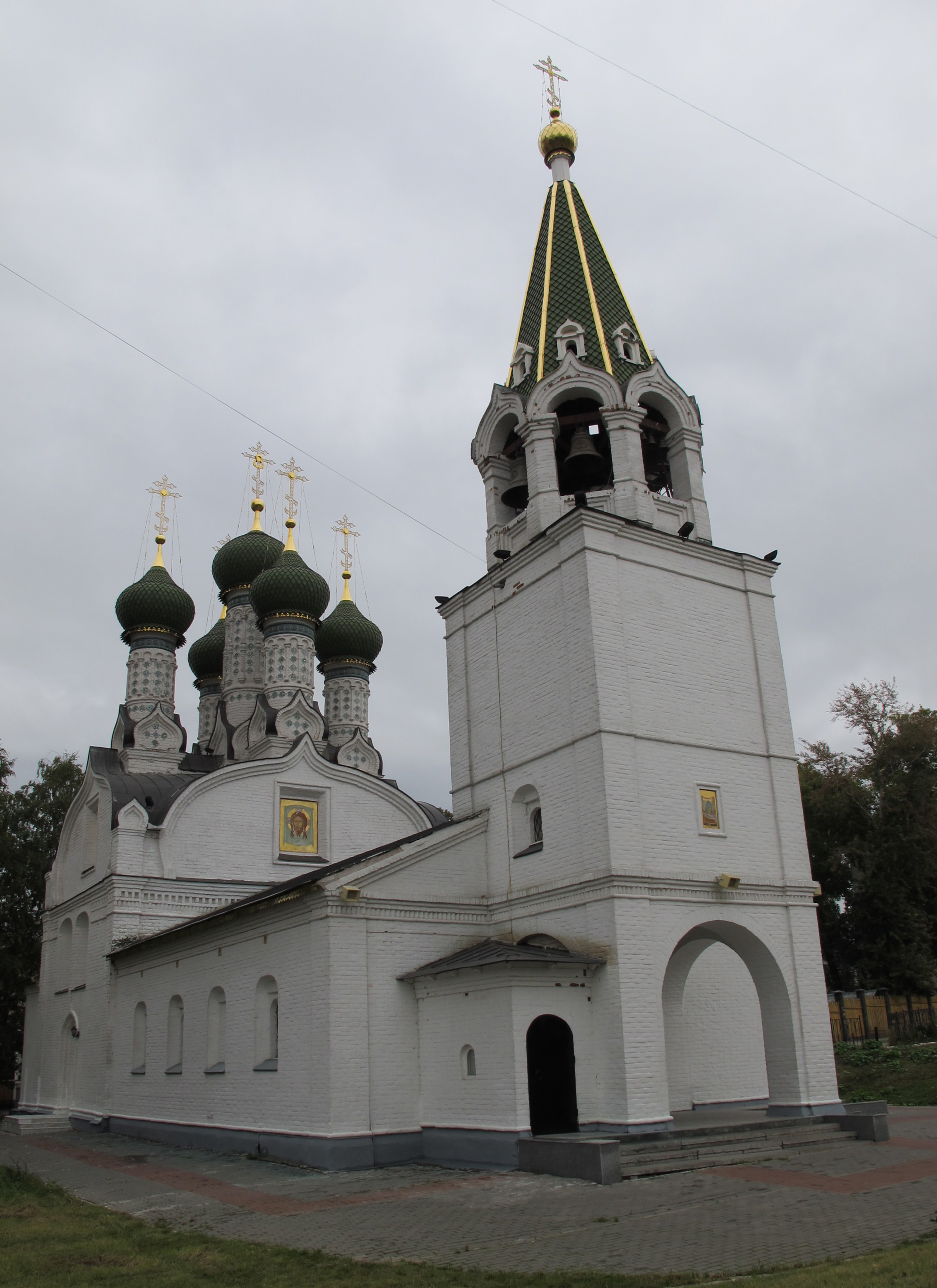 Успенская церковь на Ильинской горе, Нижний Новгород